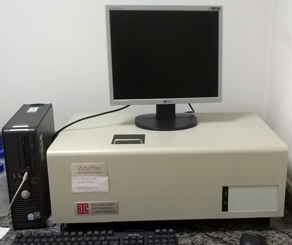 Zeta Potential Analyzer ; Brookhaven Instruments Corporation